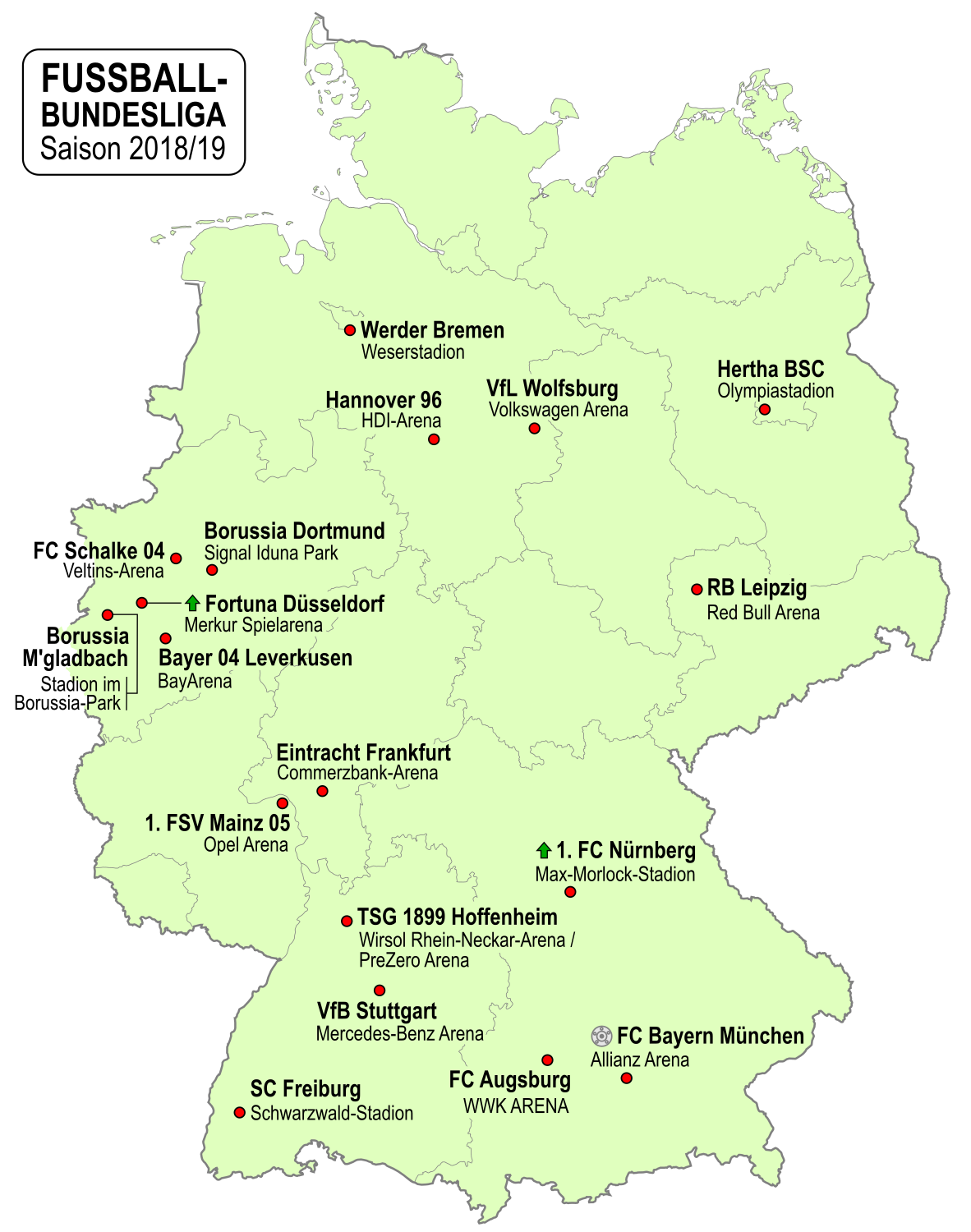 Karte der Vereine der Fußball-Bundesliga-Saison 2018/2019